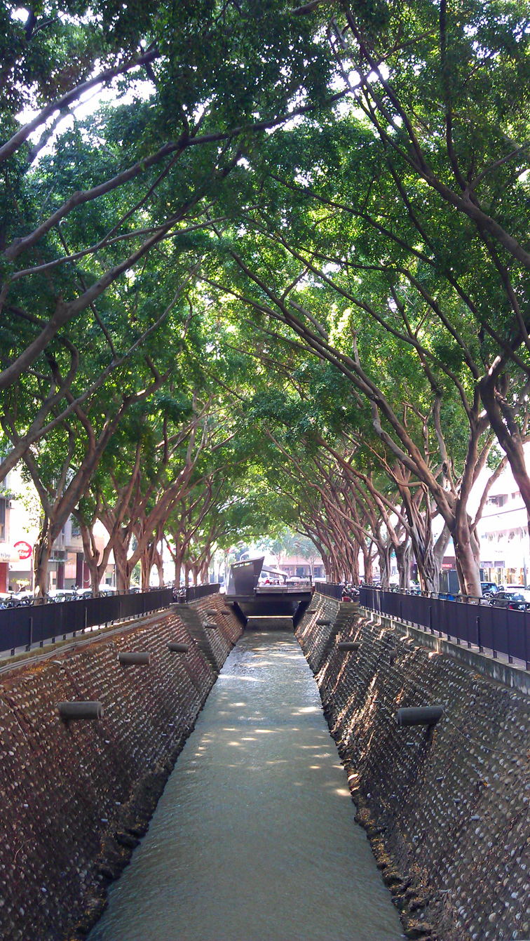 中文（台灣）: 大容東街旁楓樹溪